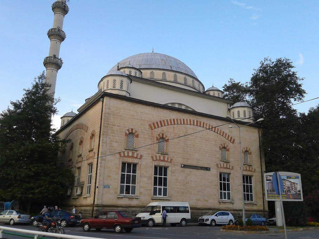 Alıntı.